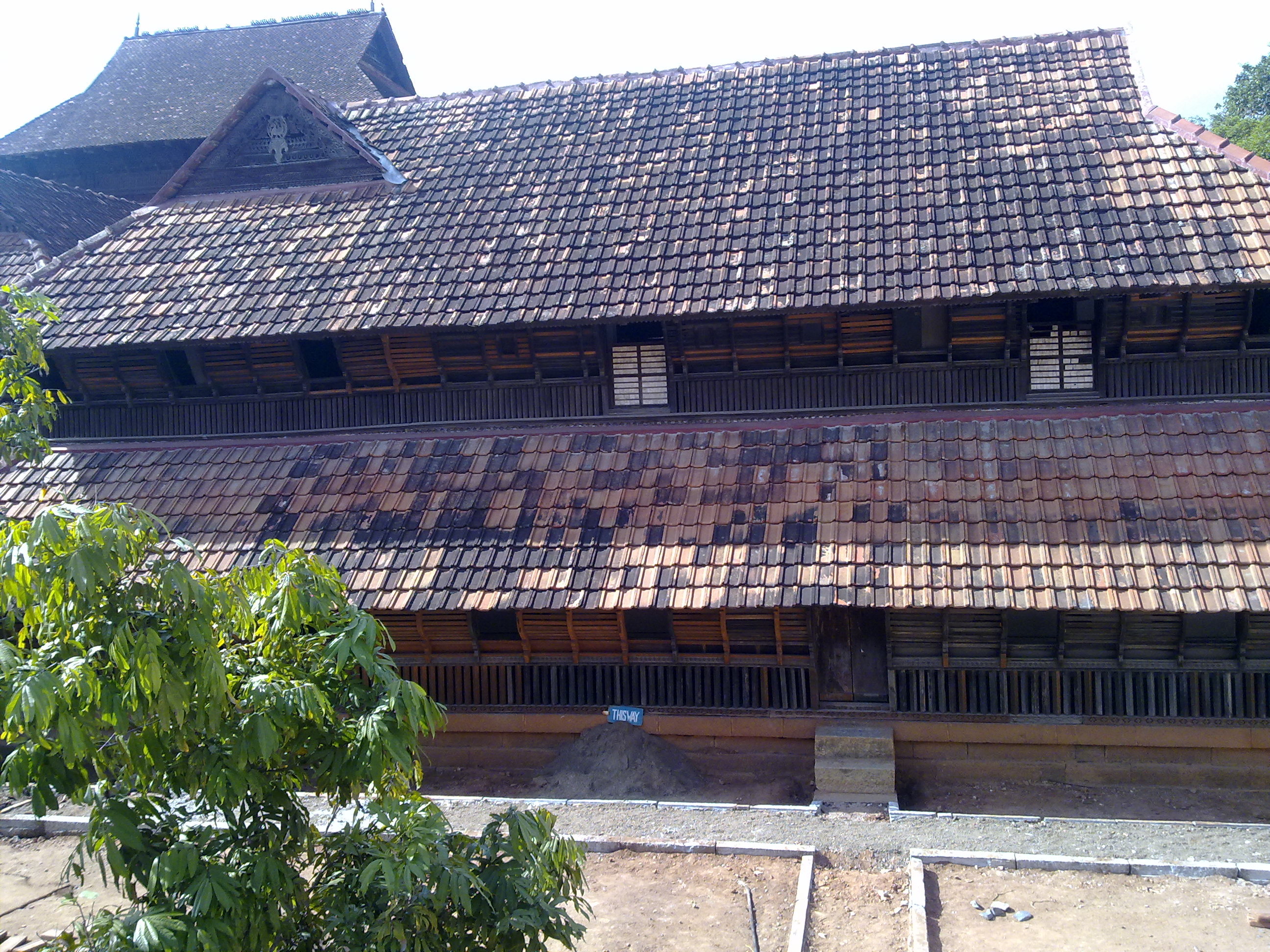 പത്മനാഭപുരം കൊട്ടാരത്തിലെ തായ്‌കൊട്ടാരം